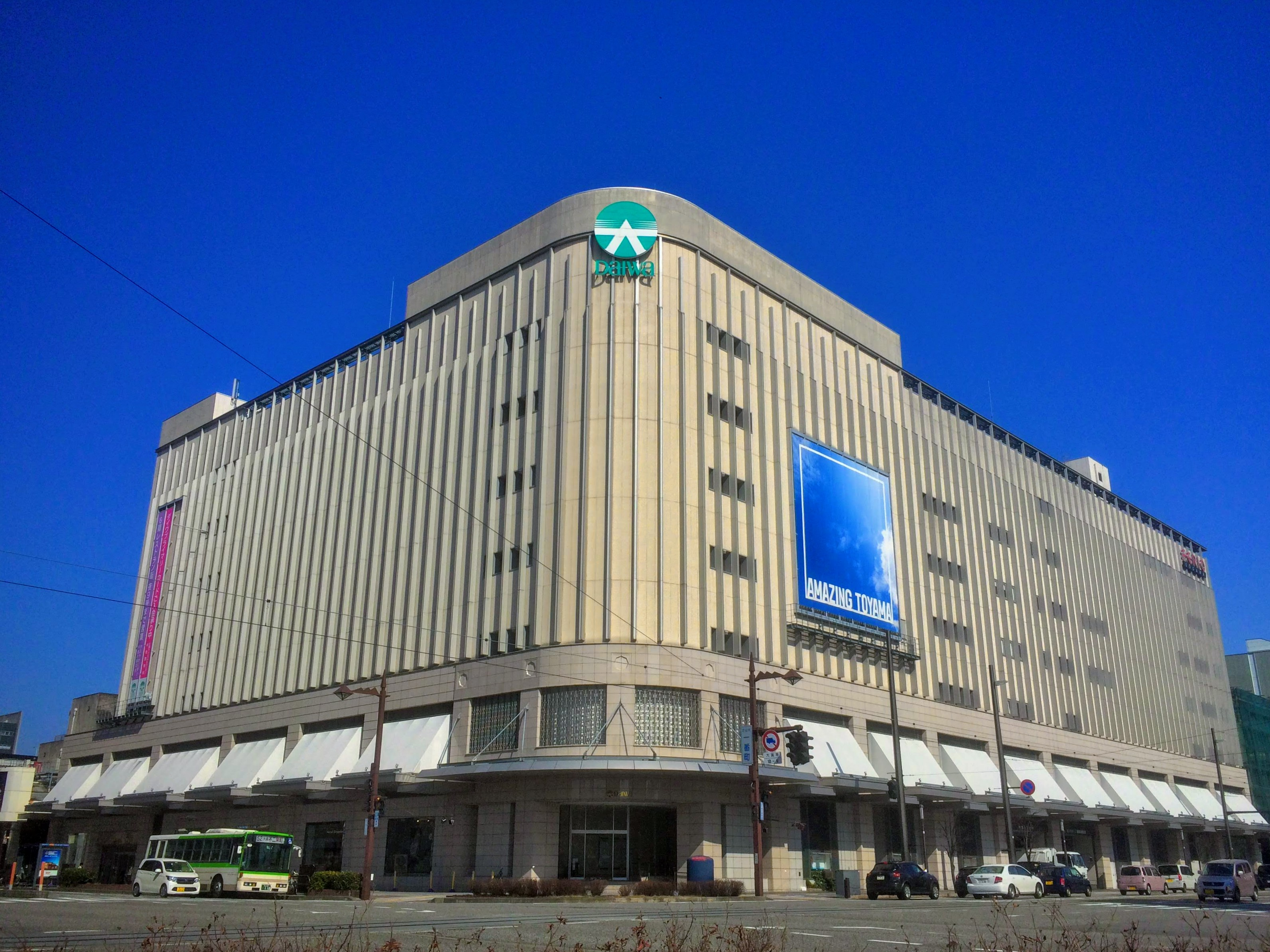 大和富山店